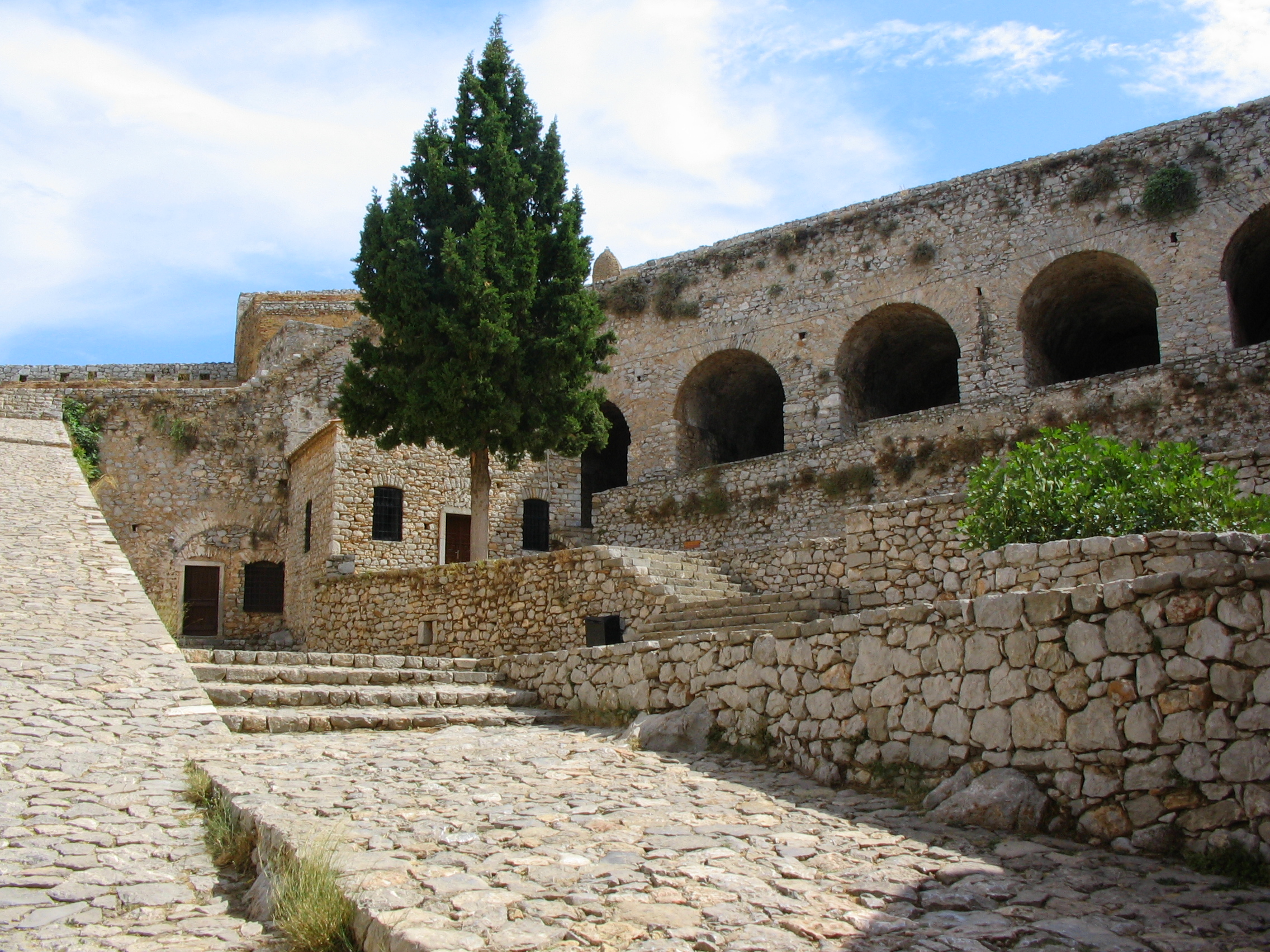 Внутренний двор крепости Паламиди